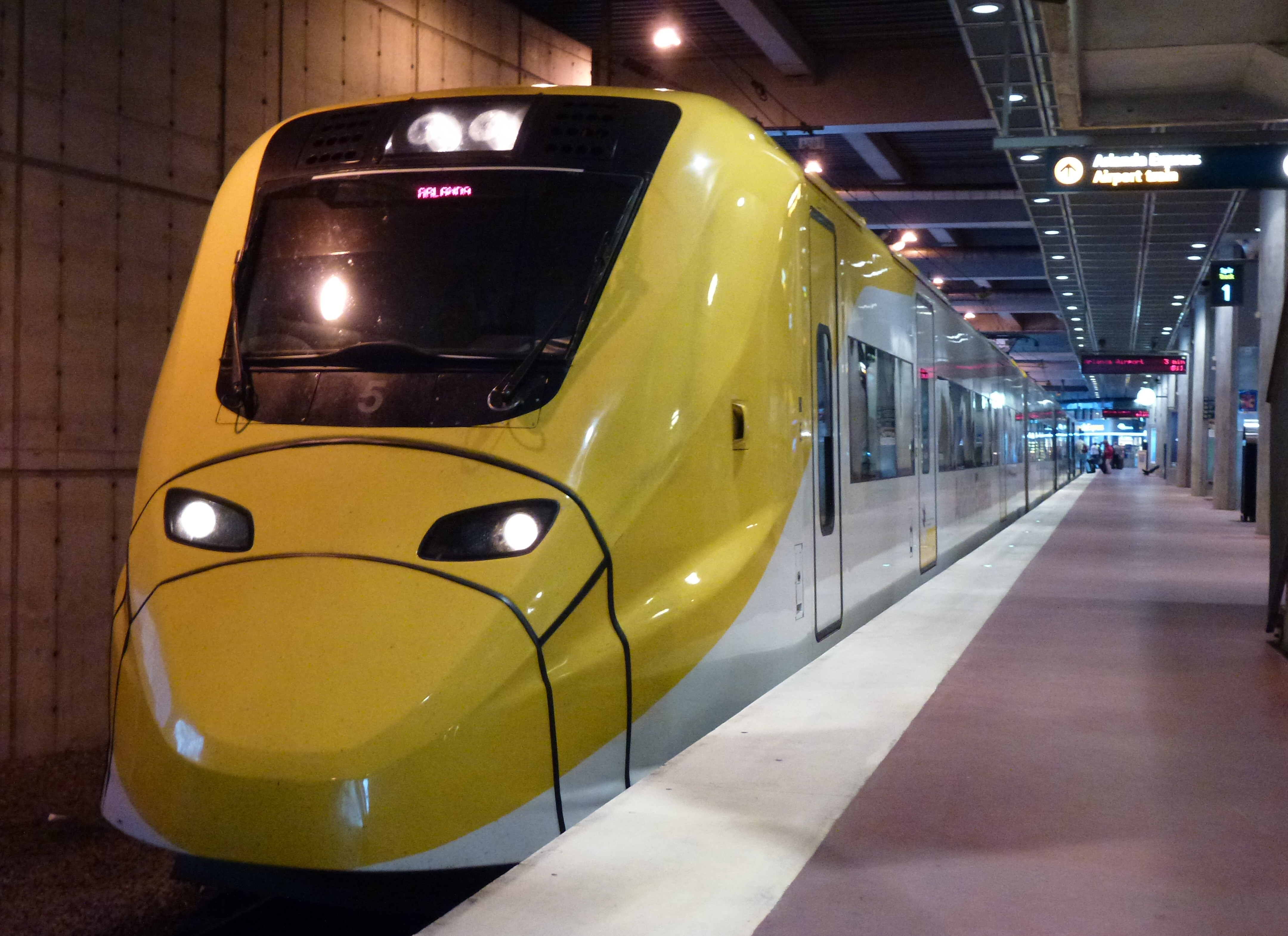 Arlanda Express på Stockholms central